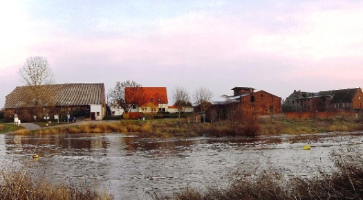 Ansicht Gottesgnadens von Westen